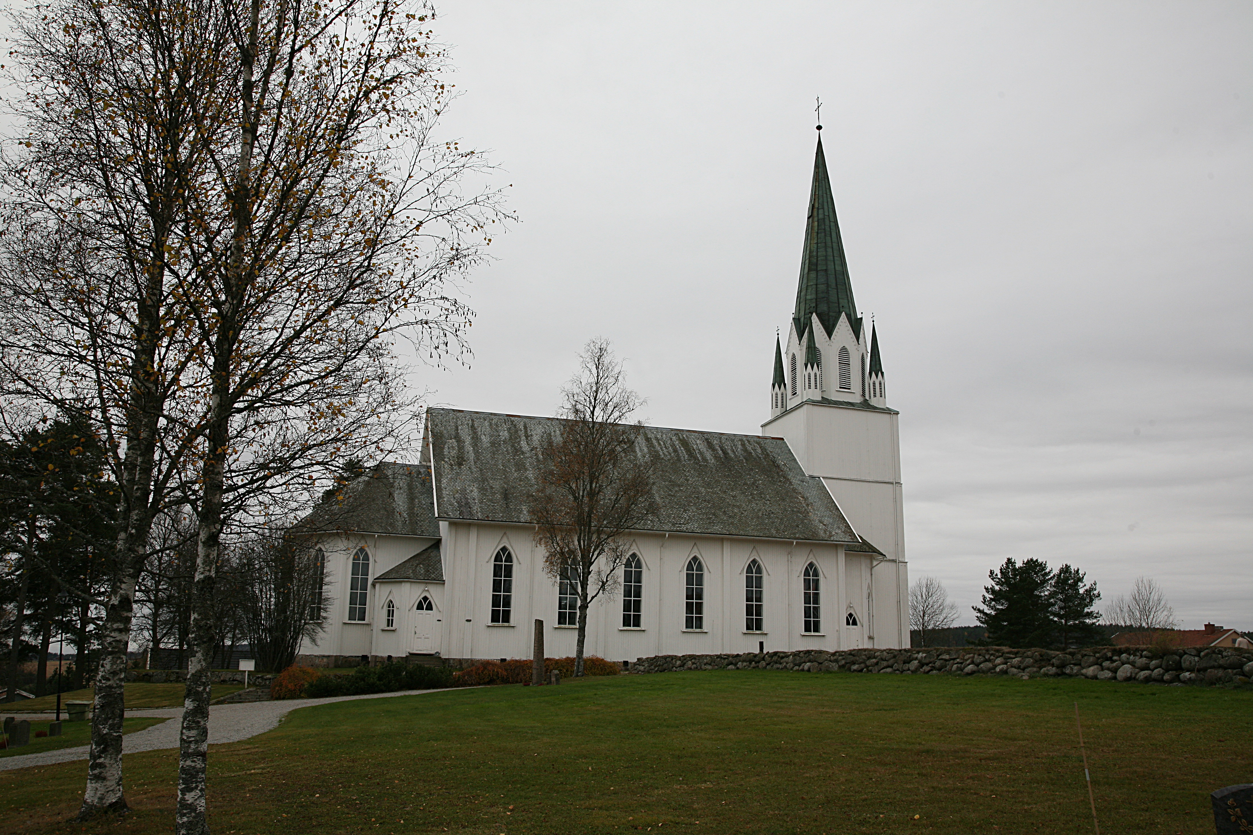 Løken kirke. Church in Aurskog-Høland, Akershus, Norway.